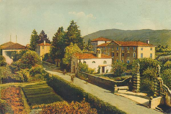 Riproduzione entrata storica Villa Ninfa Priuli.